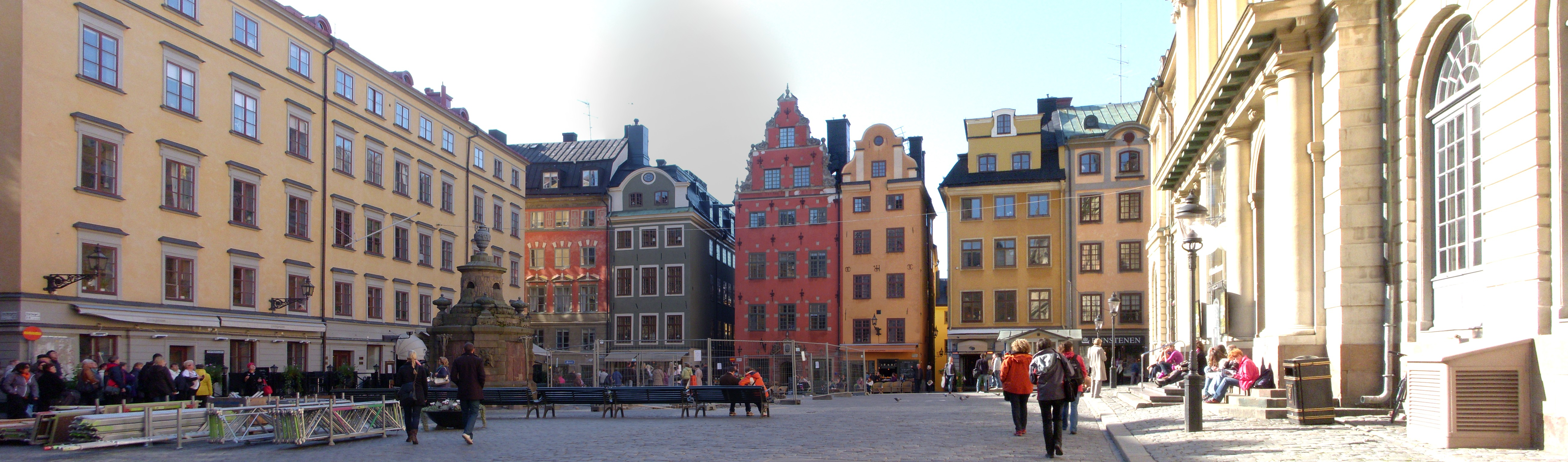 Stortorget Gamla Stan, vy mot väst med Börshuset till höger